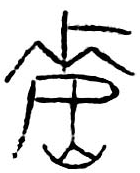 戰國晉系文字“魏”